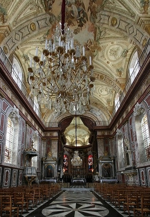 Nancy, Église de Notre-Dame-de-Bonsecours, intérieur